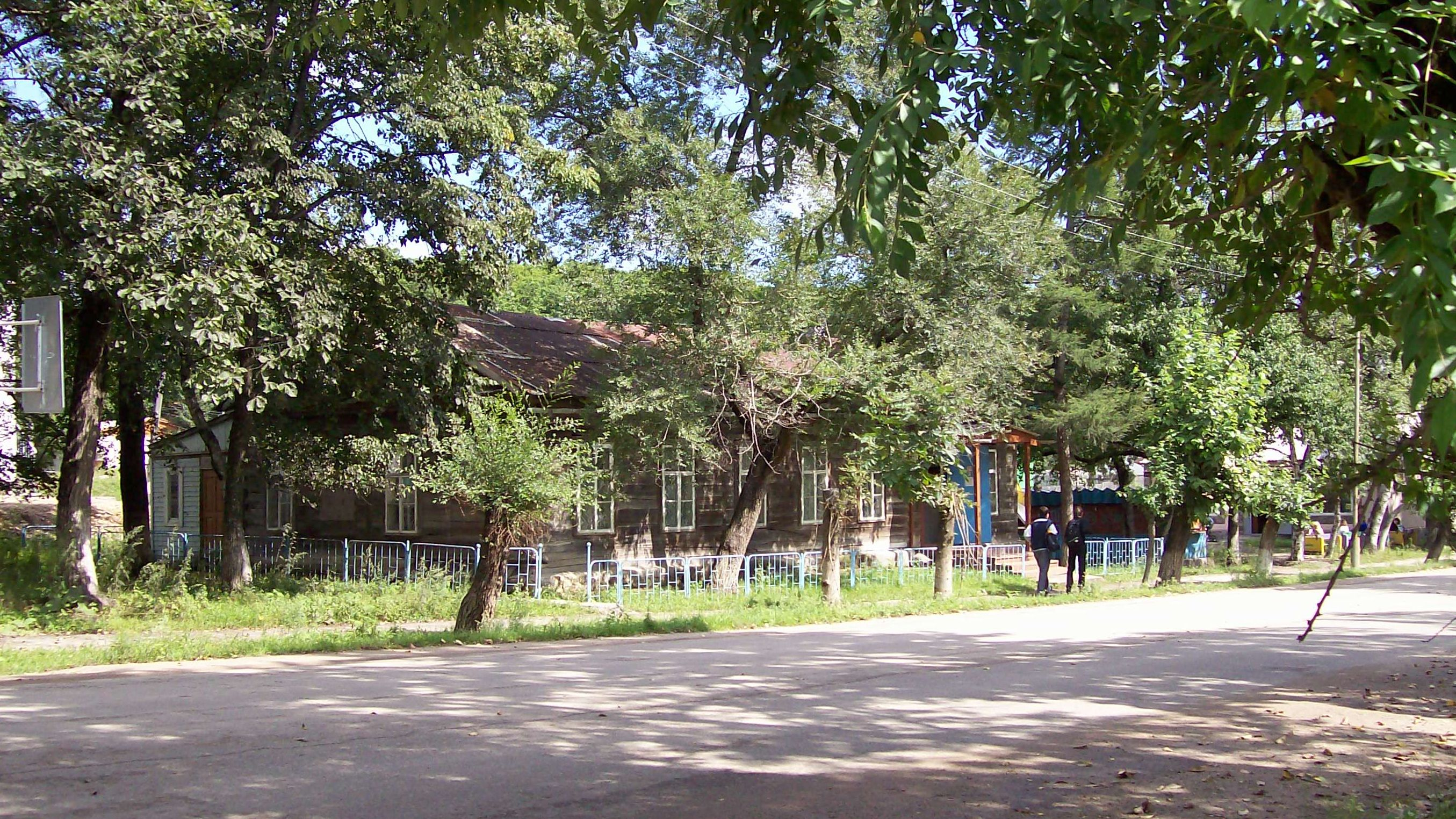 Музей поселка Ольга (Приморский край)